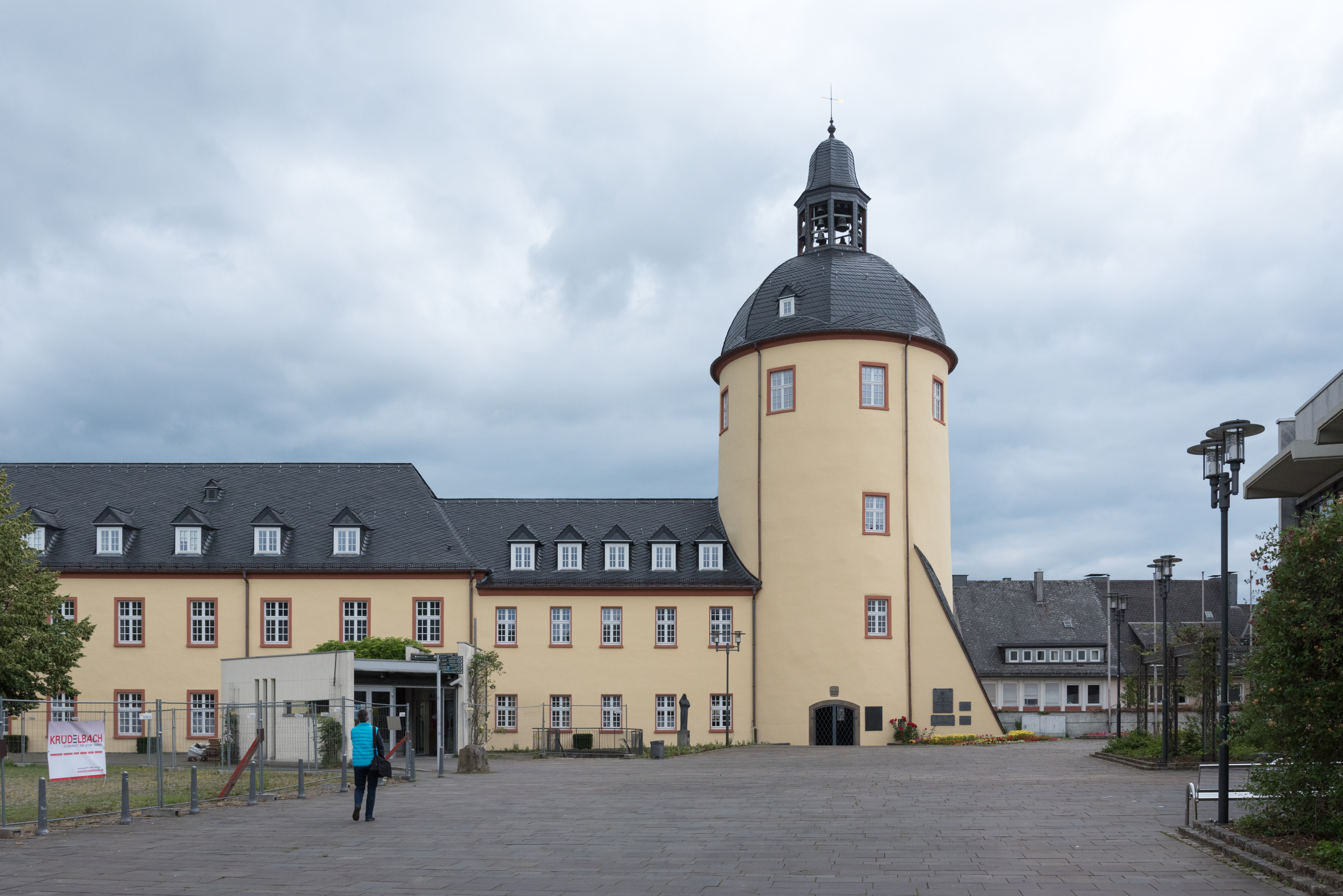 Siegen, Unteres Schloss